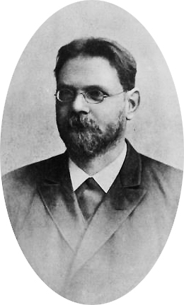 Gerhard Holm (1853-1926)